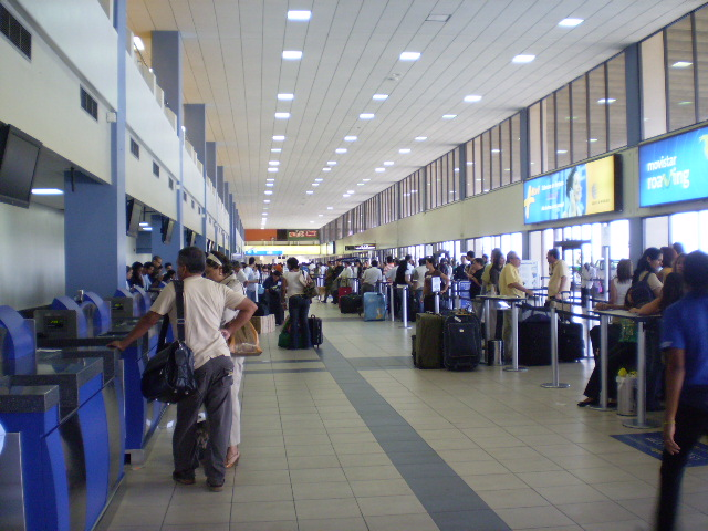 Vista do saguão principal do Aeroporto Internacional Tocumen